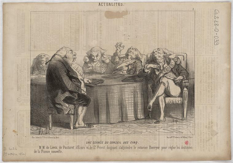 Une séance du conseil des cinq. MM. de Lévis, de Pastoret, d'Ecars et de St. Priest daignant s'adjoindre le roturier Berryer pour régler les destinées de la France nouvelle